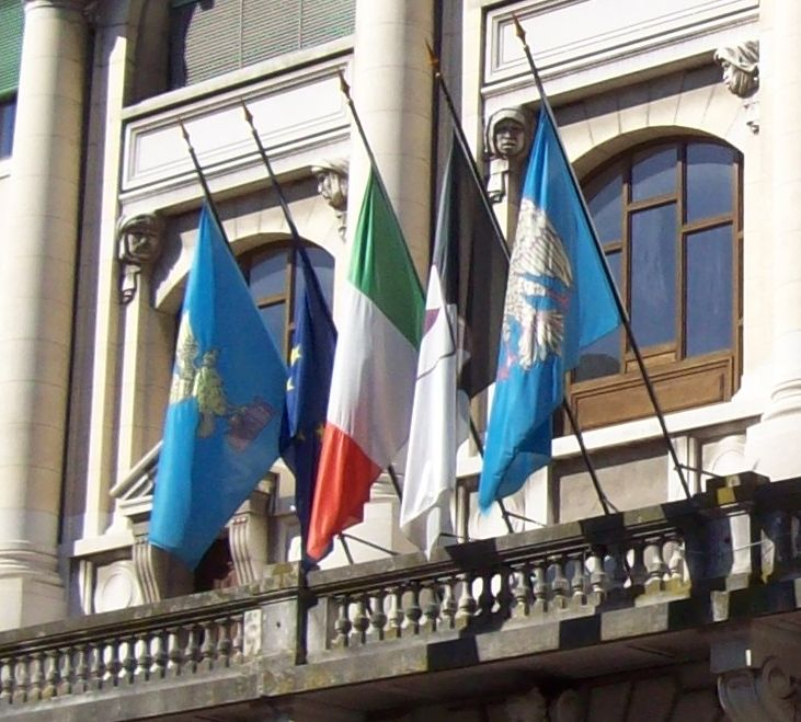 Palazzo del comune di Udine con le 5 bandiere esposte, da sinistra: regione autonoma Friuli-Venezia Giulia, Unione Europea, Repubblica Italiana, Comune di Udine e Friuli.